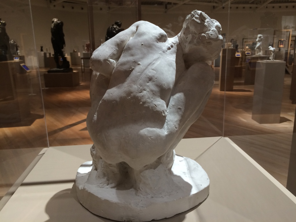 Mujer en cuclillas de Auguste Rodin.